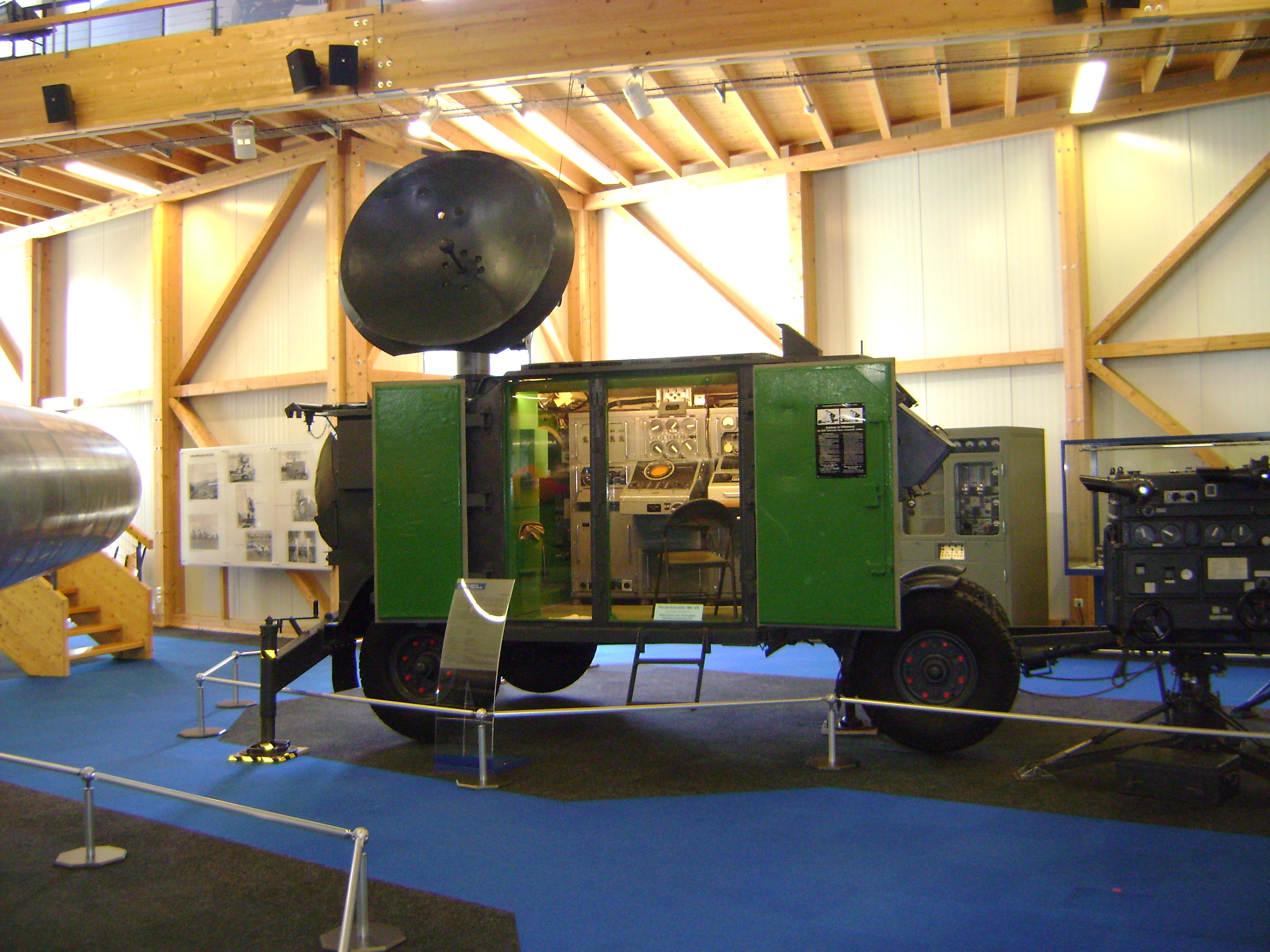 ZZR Radar